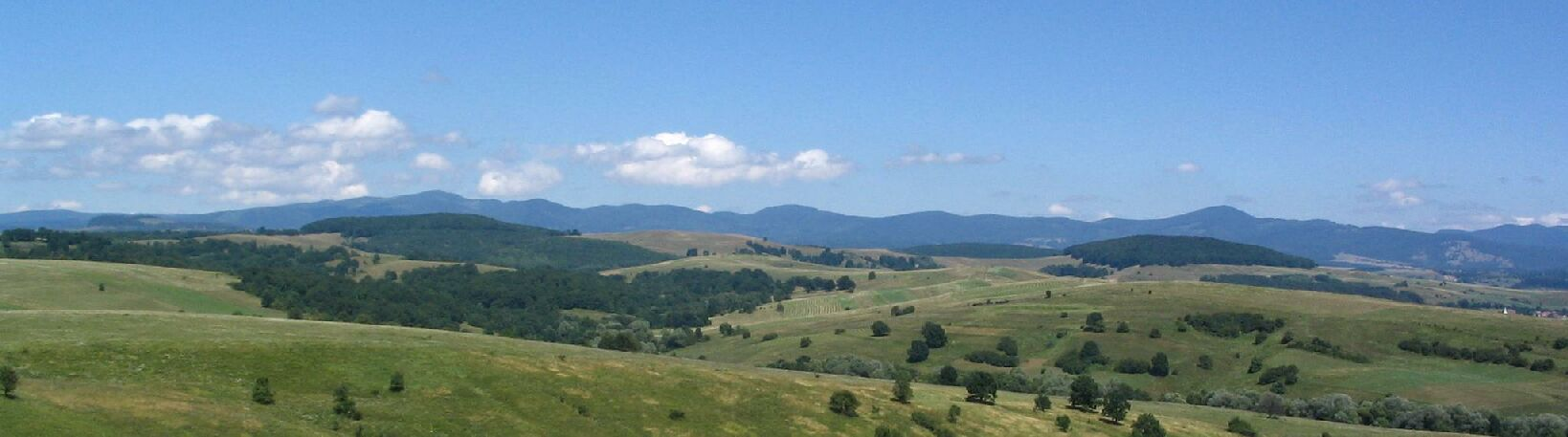 A Déli-Hargita vonulata. Hegycsúcsok balról jobbra: Kakukk-hegy (1558 m), Fekete-hegy (1368 m), Fenyős (1310 m), Kapus (1423 m), Mitács (1280 m), Nagy-Piliske (1374 m) és valamivel távolabb a Csomád-hegység négyes magaslata (1301 m). Előtérben: balra a Tortoma (701 m), középen-jobbra a Tirkó (655 m).